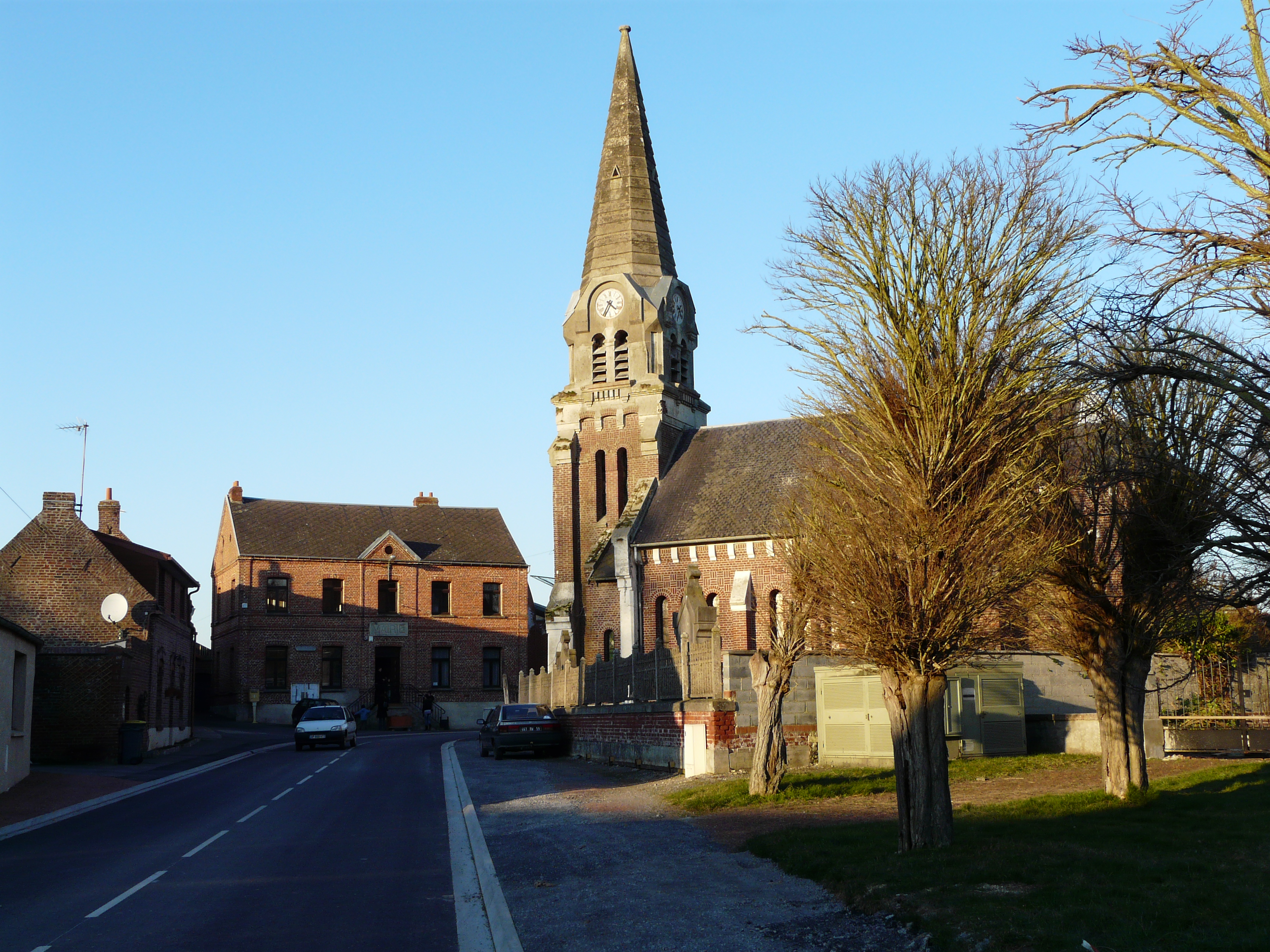 L'église et la mairie de Sancourt